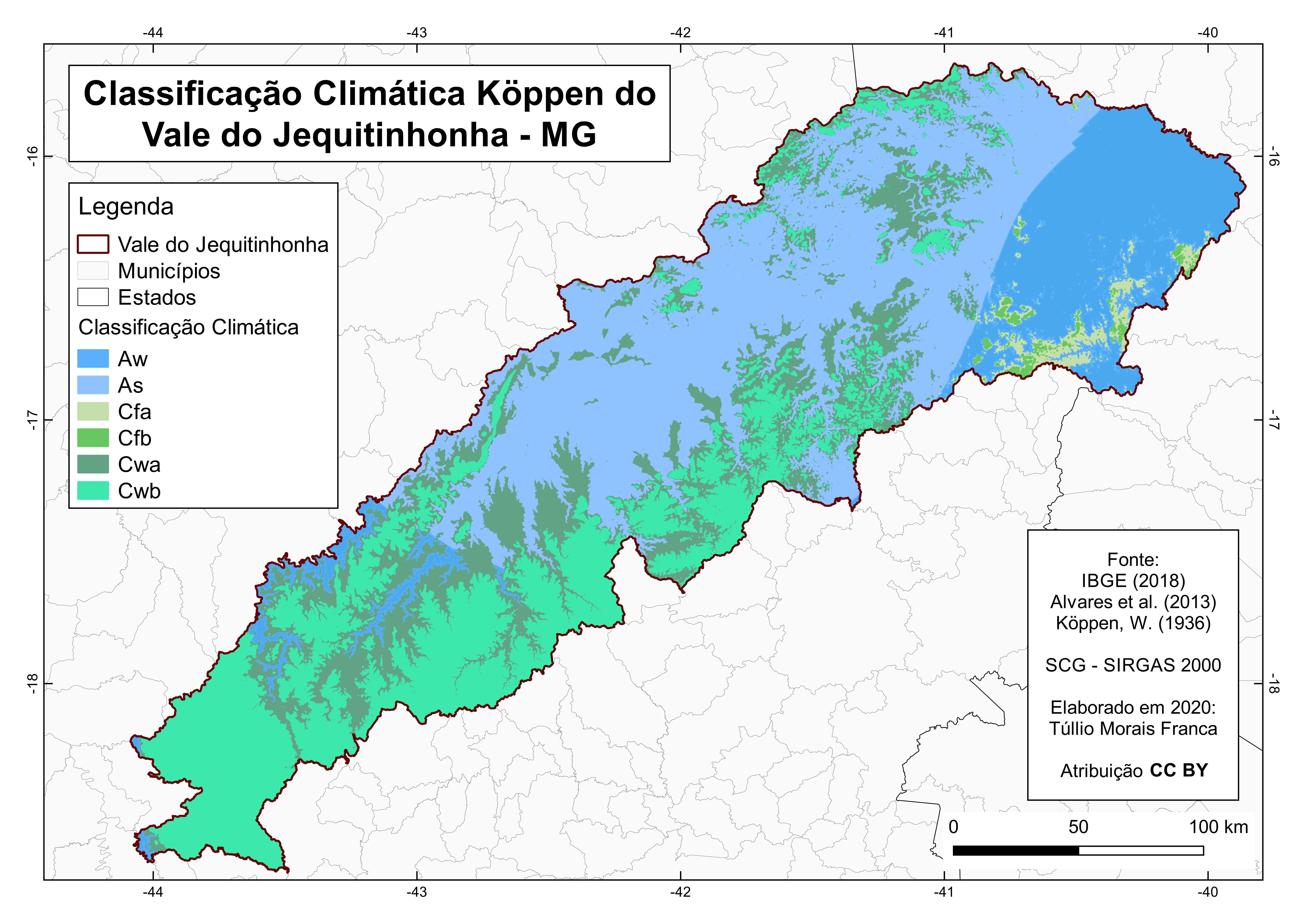 Mapa da Classificação Climática Köppen (1936) do Vale do Jequitinhonha-MG com base nos dados do trabalho Ko¨ppen’s climate classification map for Brazil de Alvares et al. (2013).